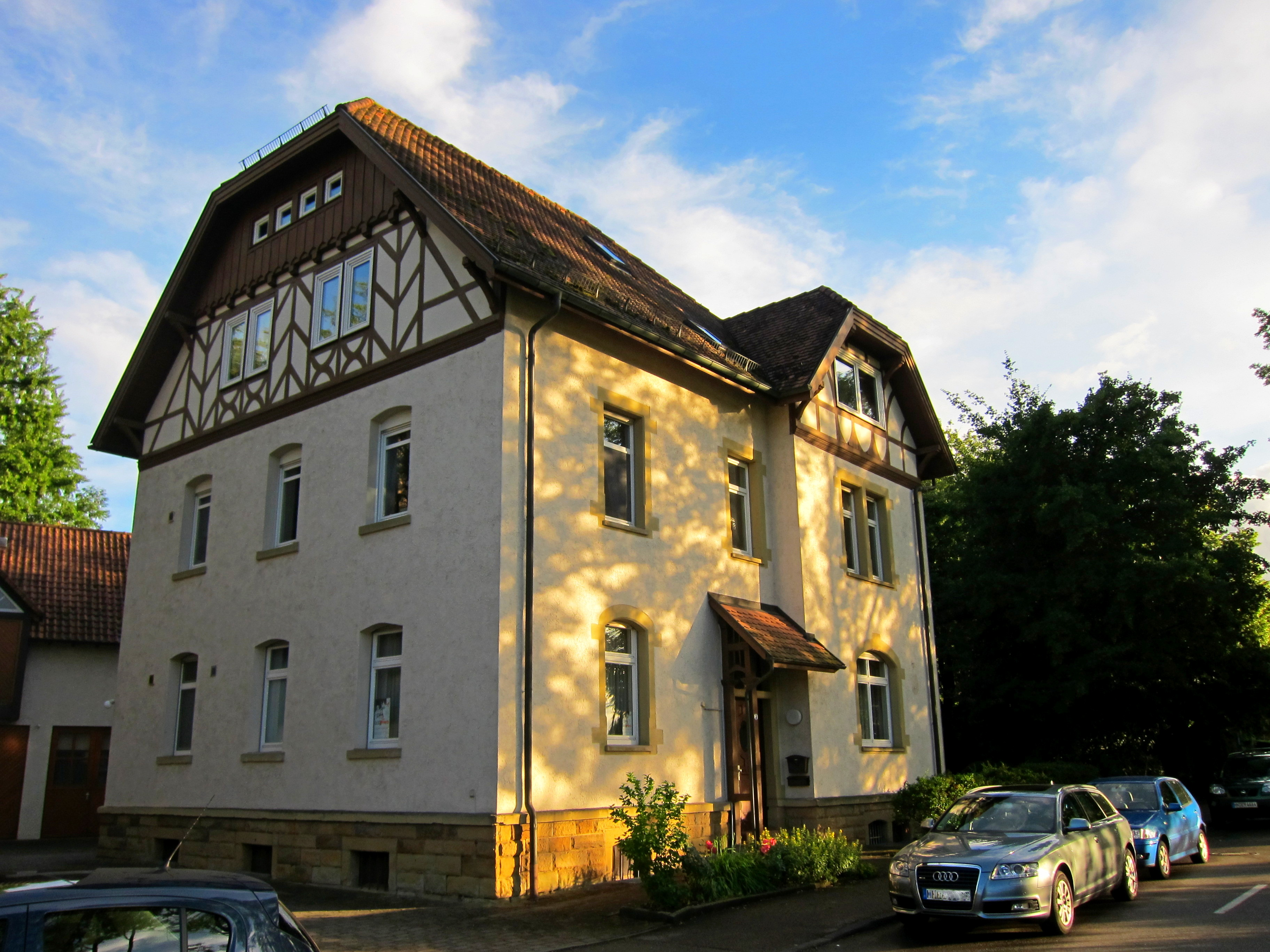 Um das Jahr 1900 erbaute ehemalige Arztvilla in Neuenstadt am Kocher Lindenstraße 4. Gehört heute dem Verein Liederkanz 1835 e.V. Neuenstadt und wird von den Freilcihtspielen als Vereinsheim und für das Kleine Lindentheater genutzt.